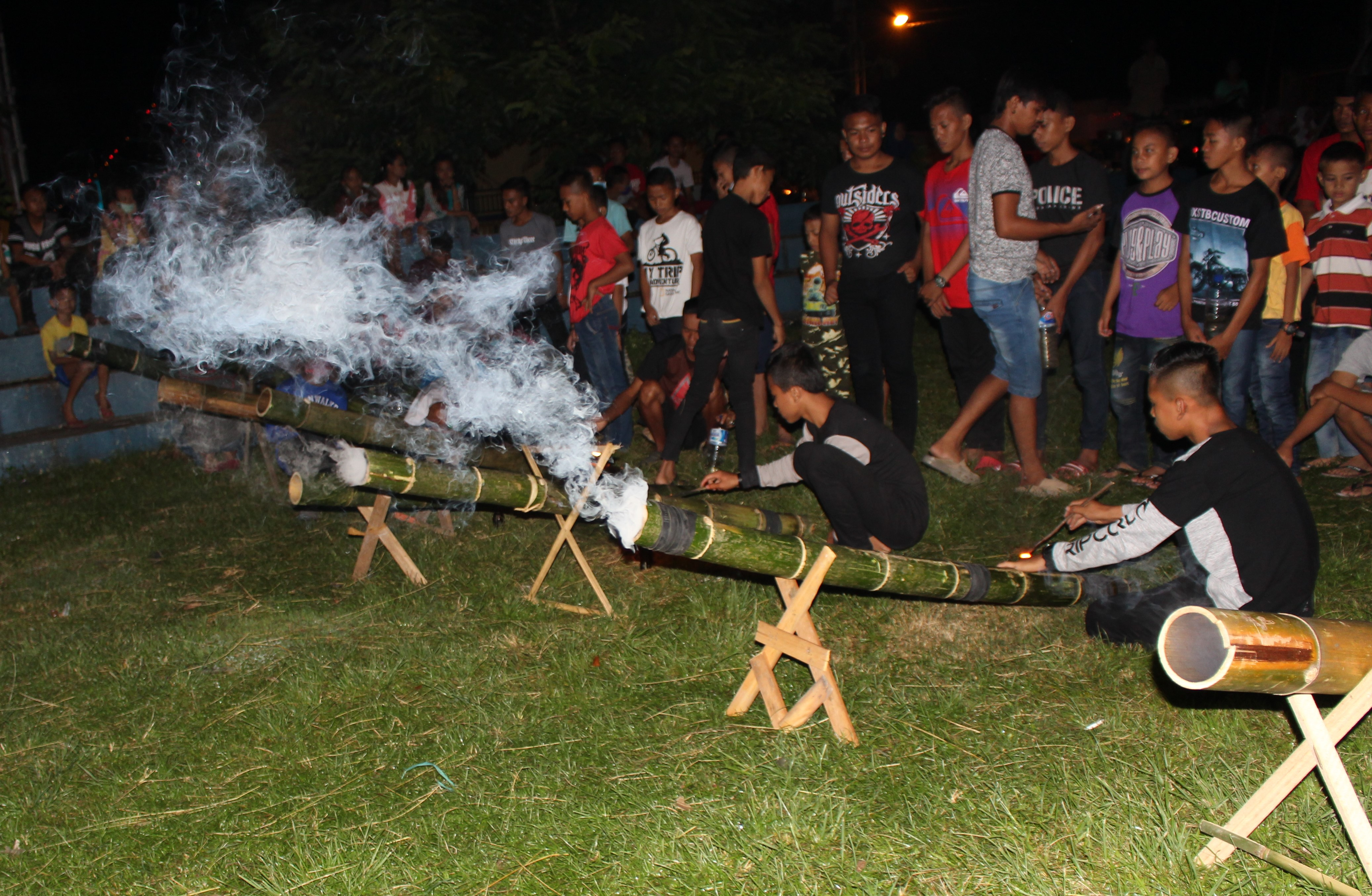 Meriam bambu atau di Gorontalo dikenal dengan nama "Bunggo" adalah permainan tradisional melayu khas yang populer dan dikenal di berbagai daerah. Permainan ini marak dimainkan anak-anak saat pulan puasa.